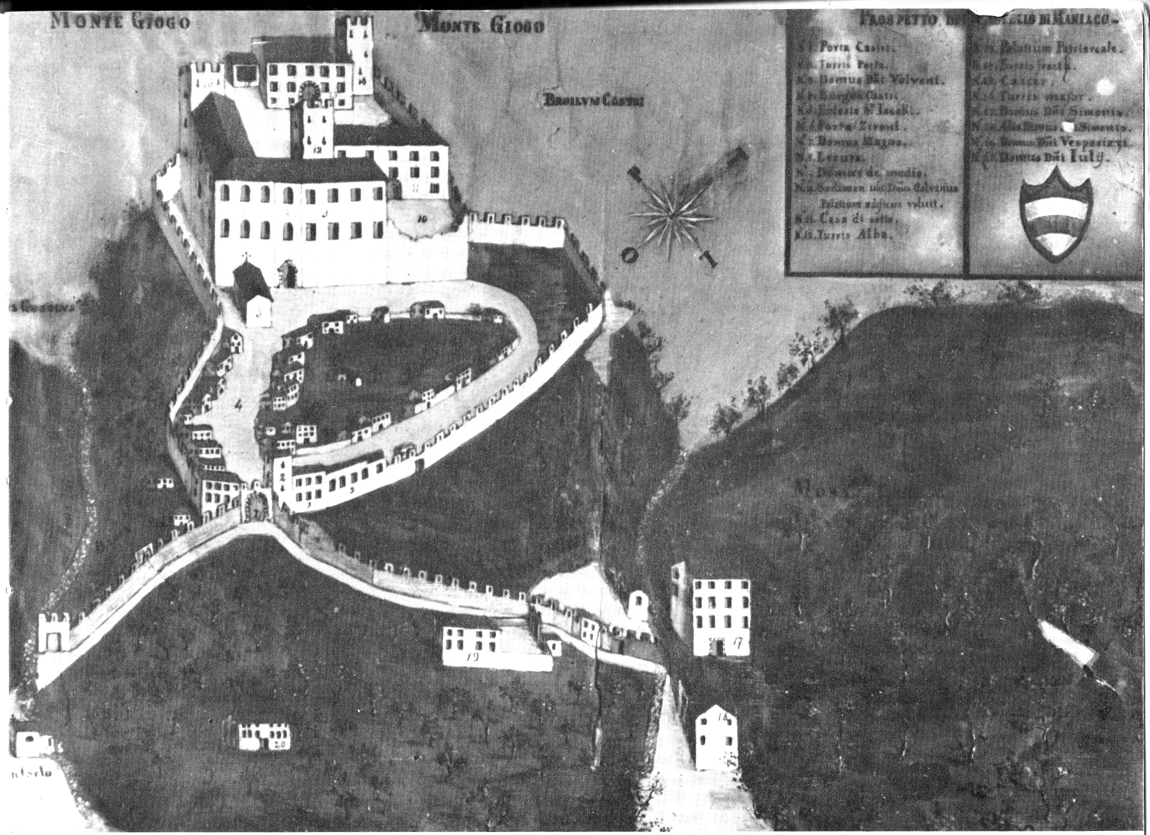 Dipinto del '600 del Castello di Maniago, basato su un originale del '400.